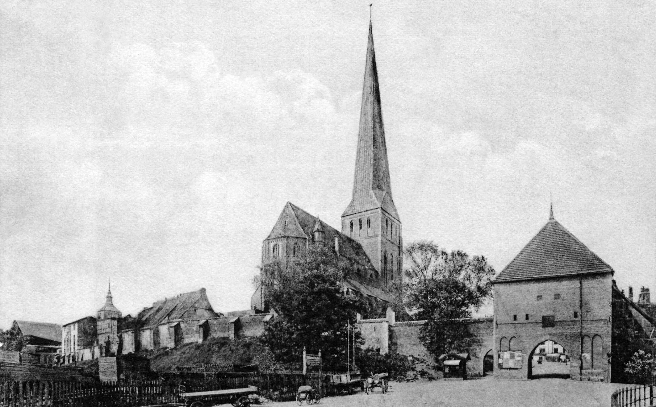 Rostock, Mecklenburg-Vorpommern: Petrikirche, Petritor und Stadtmauer